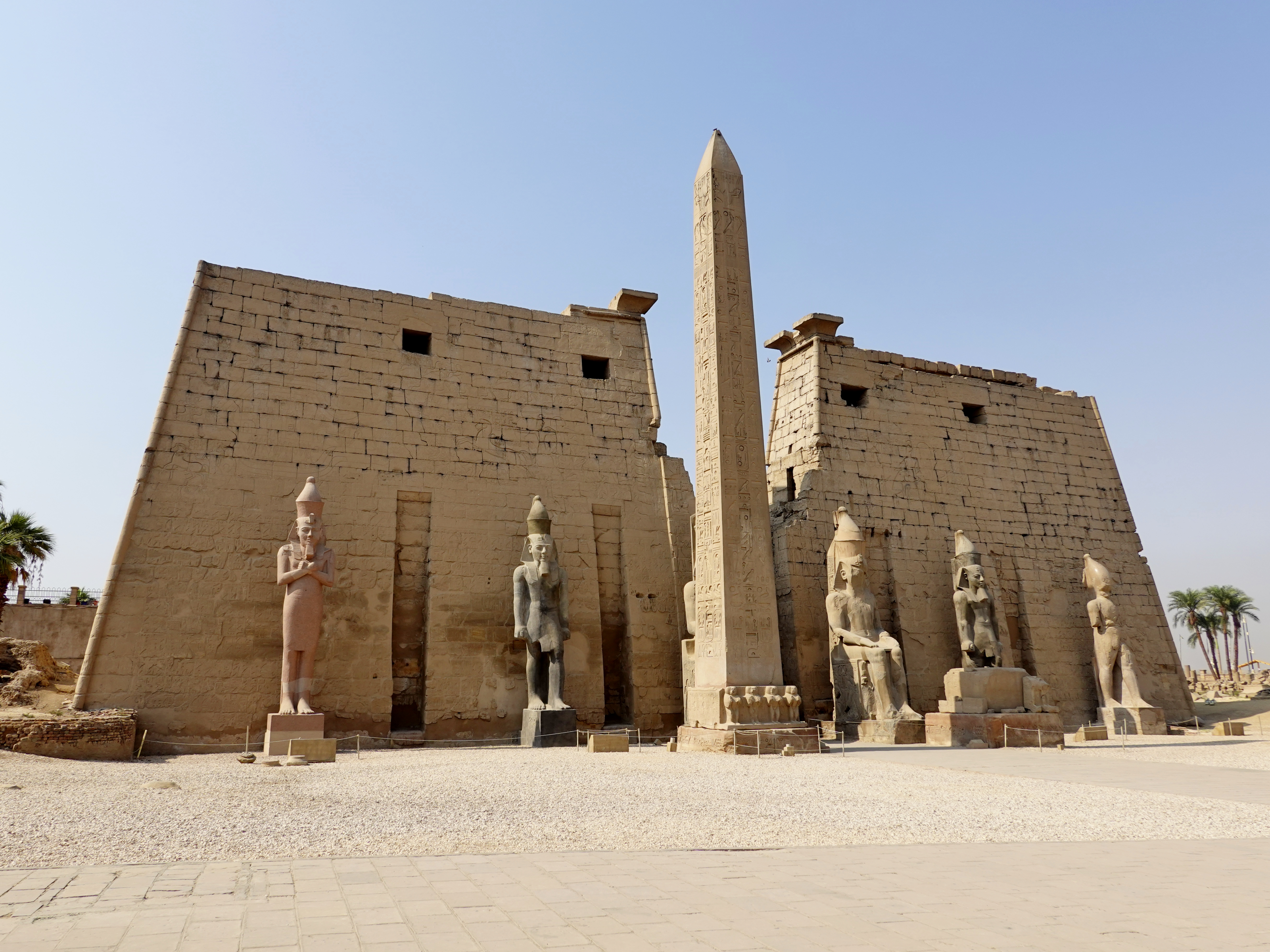 Pylon des Luxor-Tempels in Luxor, Ägypten